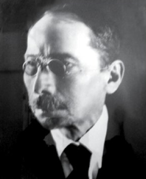 Fotografía de Jaime Mendoza.